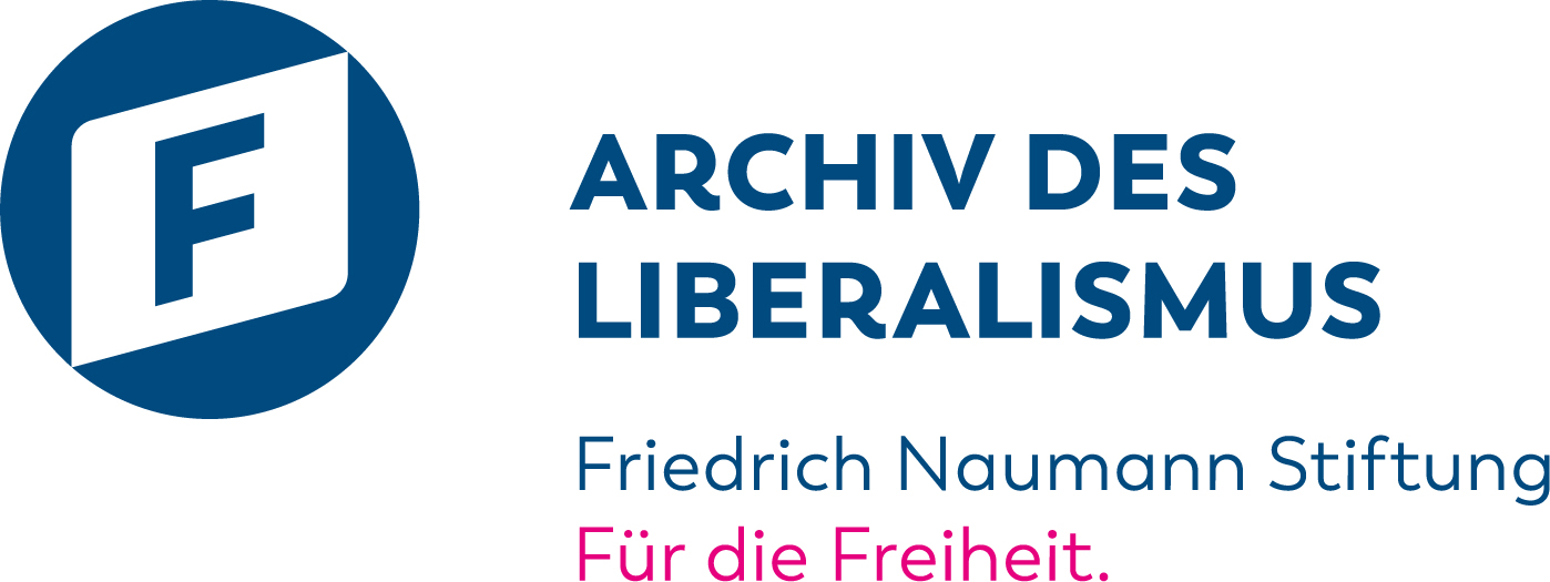 Logo 2019